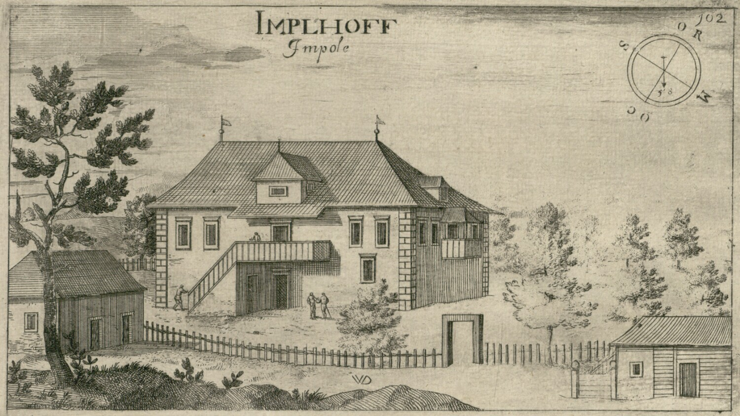 Dvorec Impoljca